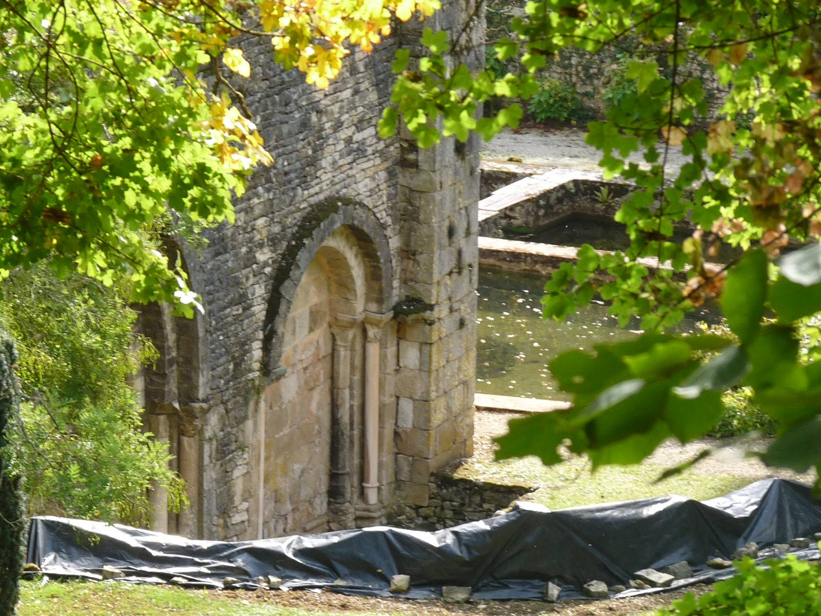 ancienne abbaye de Nanteuil-en-Vallée, Charente, France; bassins et Salle du Trésor vus du nord-est